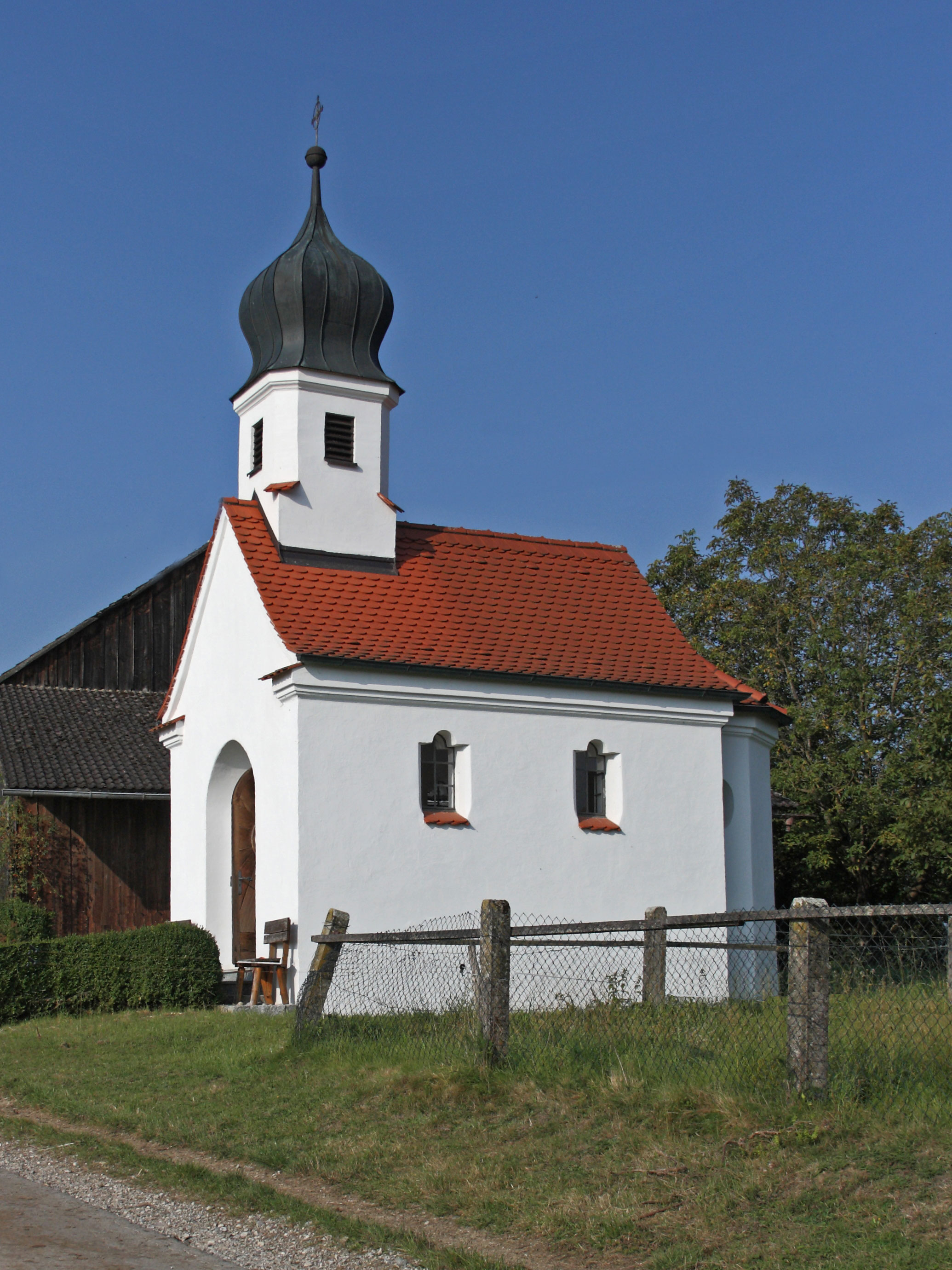 Kapelle von Südosten gesehen